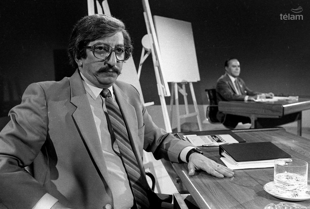 Firma del Tratado de Paz por el Canal de Beagle (25/11/1984). Dante Caputo, canciller y a favor del Tratado de Paz, y Vicente Saadi, senador justicialista en contra del acuerdo, participaron de un histórico debate televisivo.